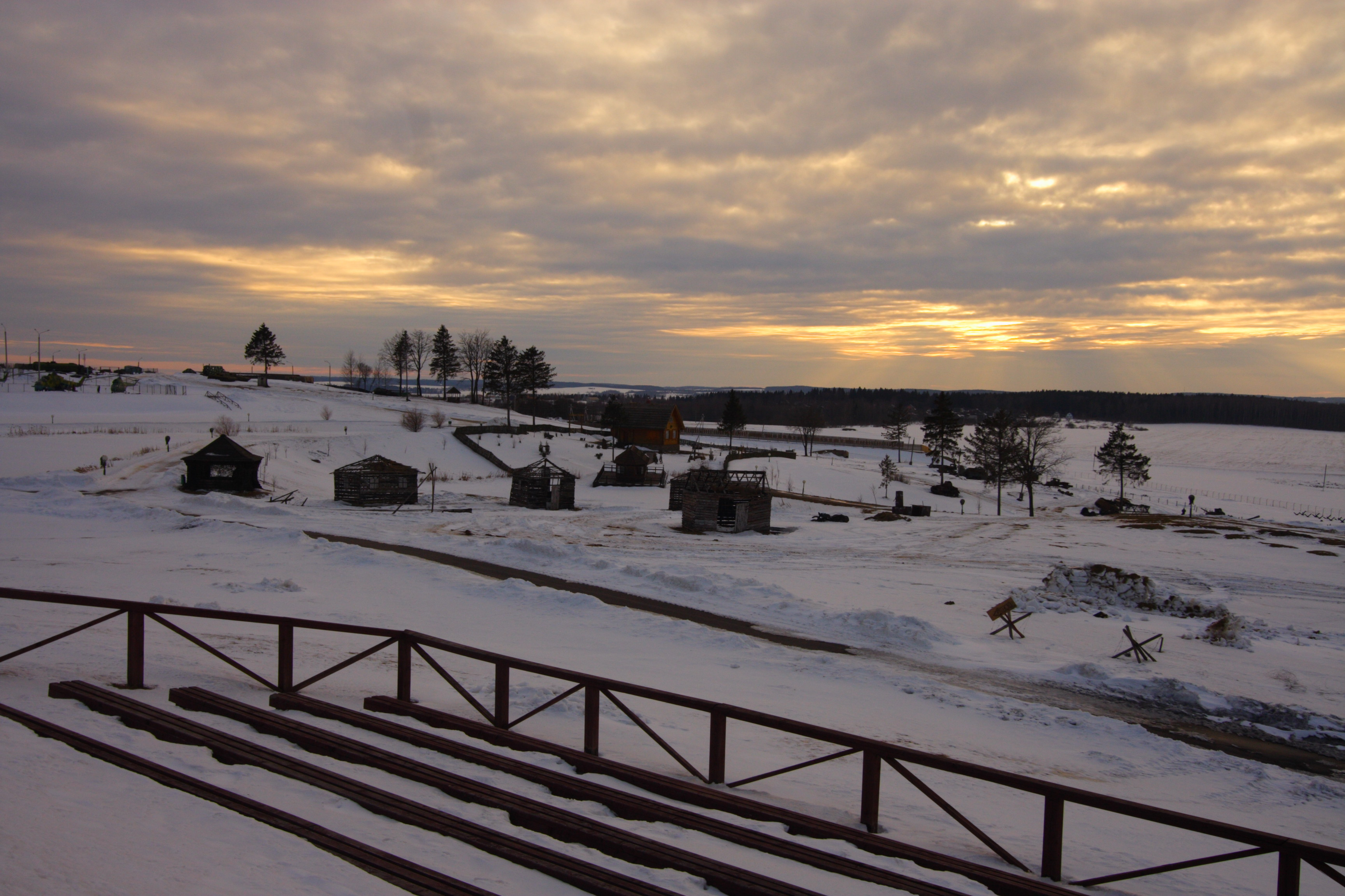 Stalin line - battlefield